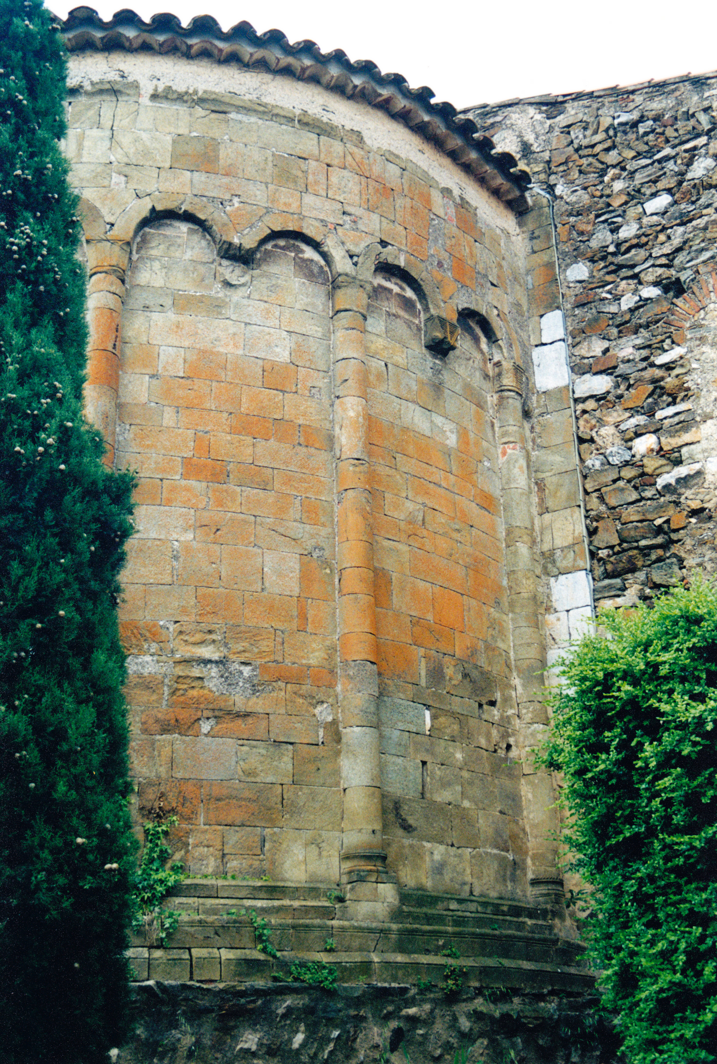 France - Pyrénées-Orientales - Aspres - Église Saint-Félix de Calmeilles